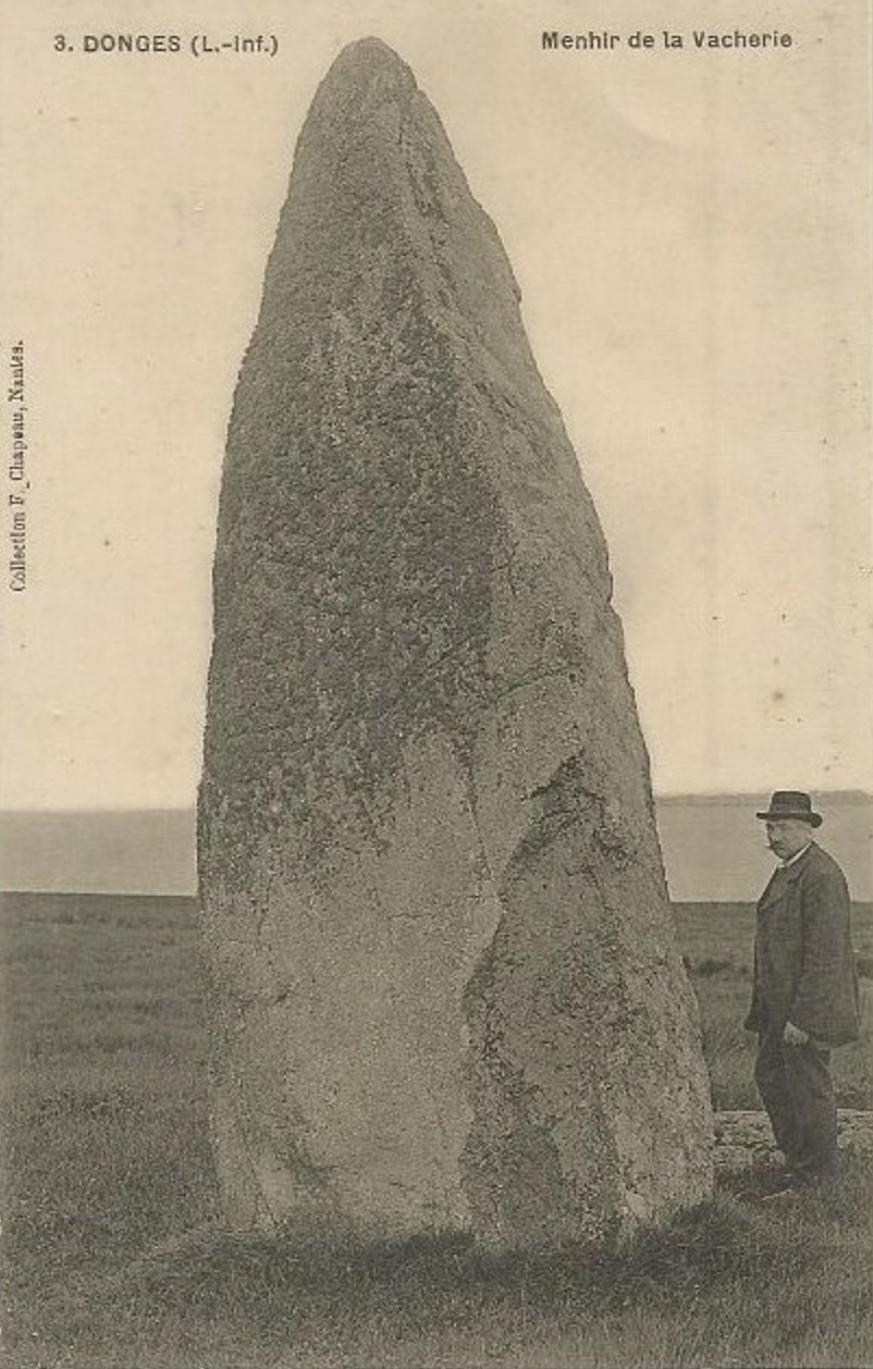 CPA Menhir de la vacherie - 44 Donges